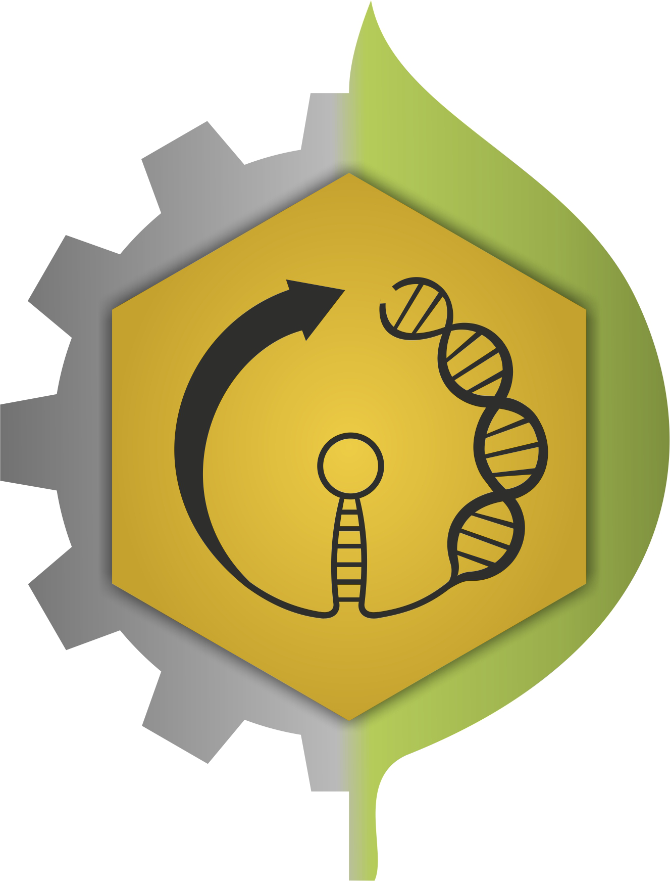 Símbolo dos Bacharéis em Bioquímica do Brasil. Símbolo Simbolo Bioquímica Bioquimica Bioquímico Bioquimico graduação bacharelado Logo